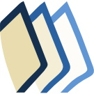 Wikibooks logo